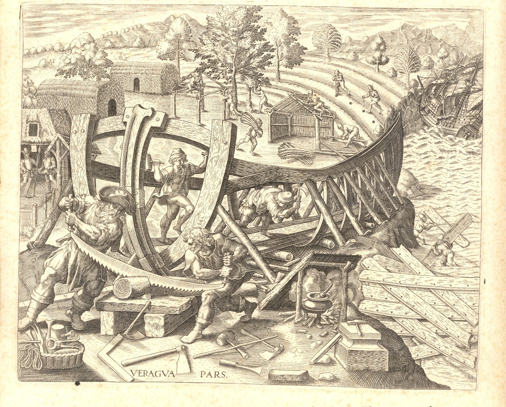 Els mariners d'en Colom cnstrueixen el fort de la Nativitat amb les restes de la Santa Maria.